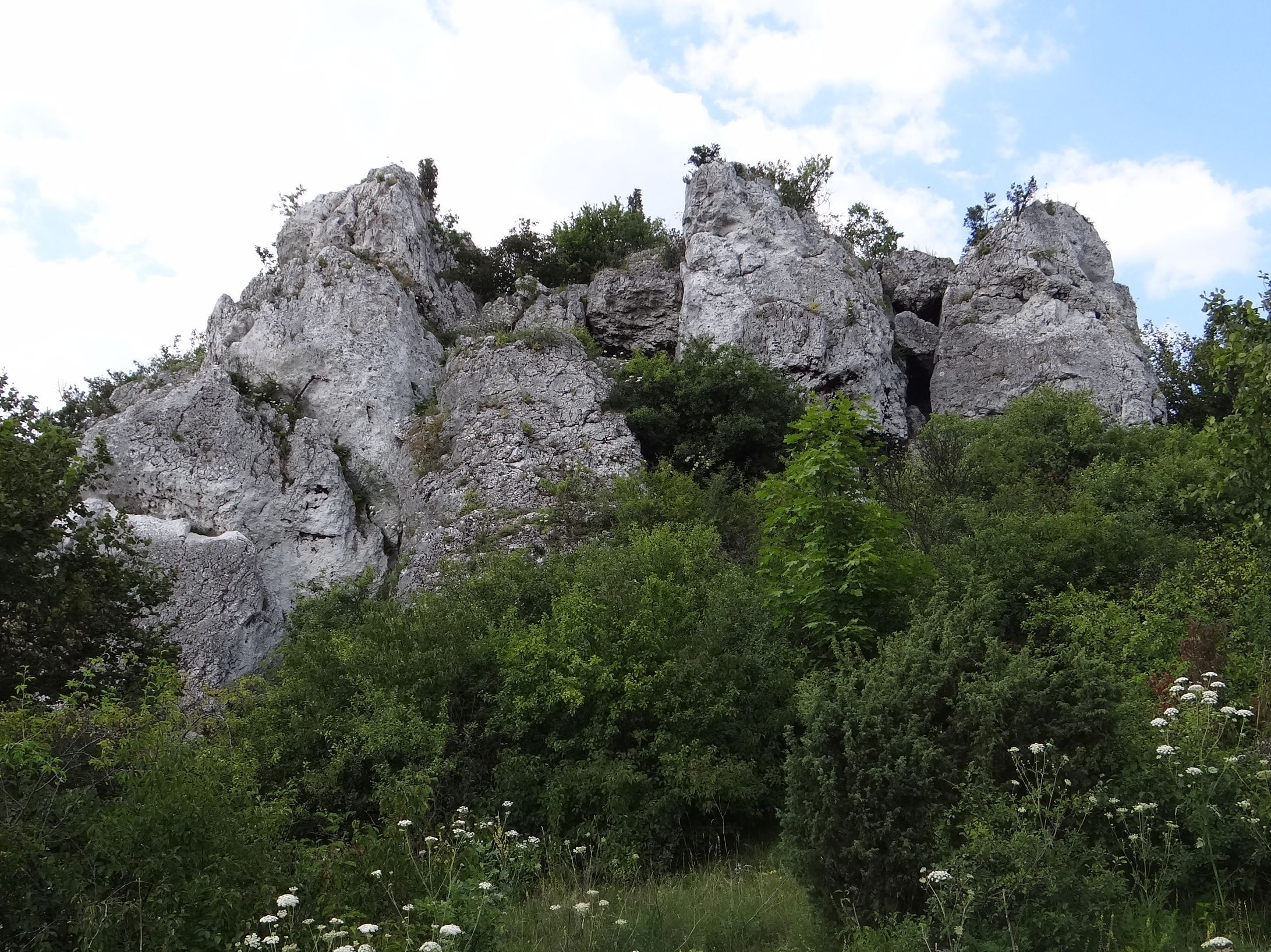 Skała Biały Filarek w grupie Skał Rzędkowickich